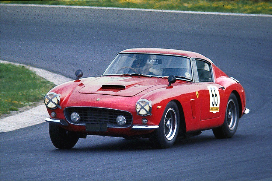 Ferrari 250 GT, Baujahr 1960, beim Oldtimer-Grand-Prix des AvD auf dem Nürburgring